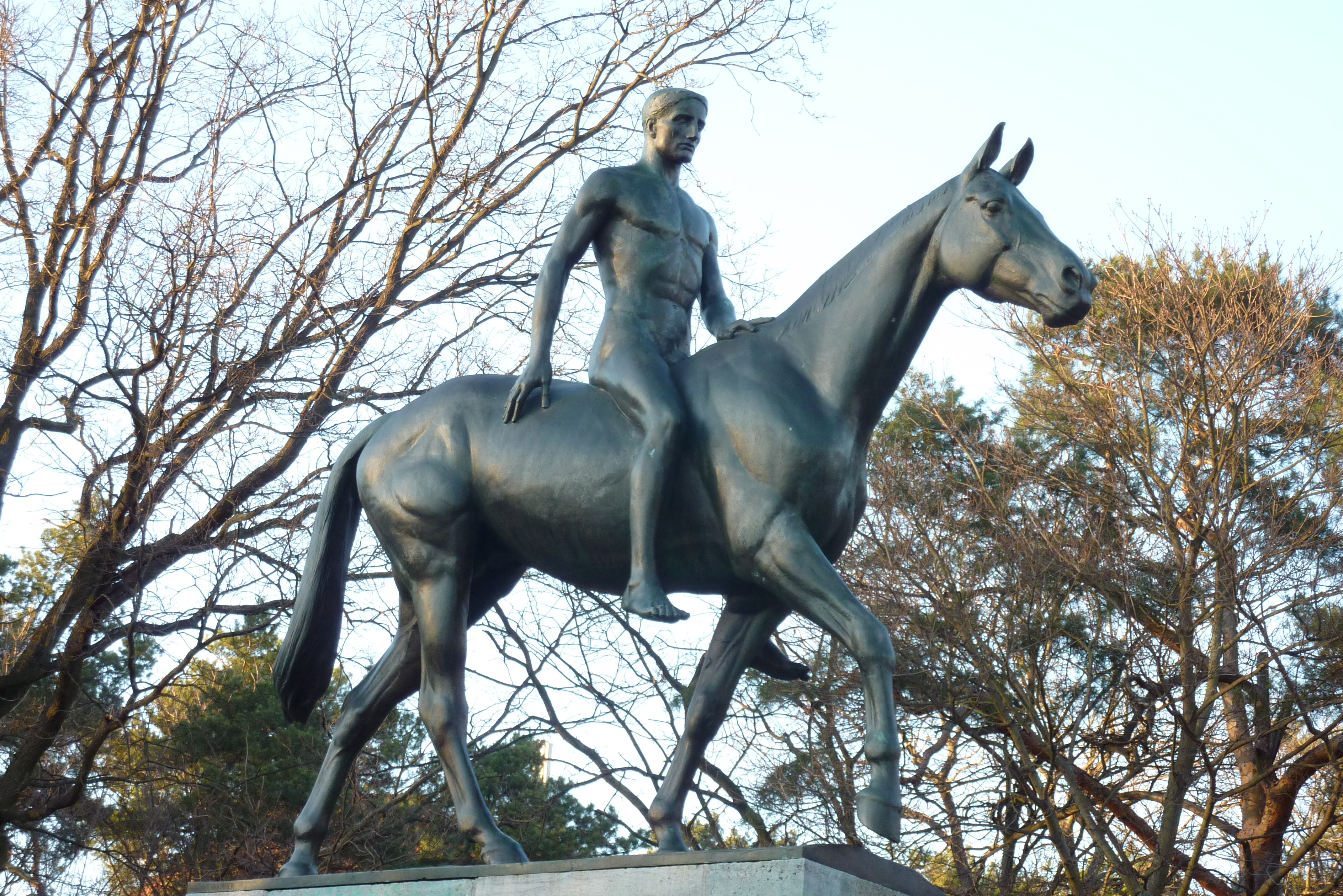 Reiterstandbild von Willibald Fritsch aus dem Jahr 1925, nahe der Trabrennbahn Karlshorst und der Treskowallee. Ansicht in Richtung Nordosten.